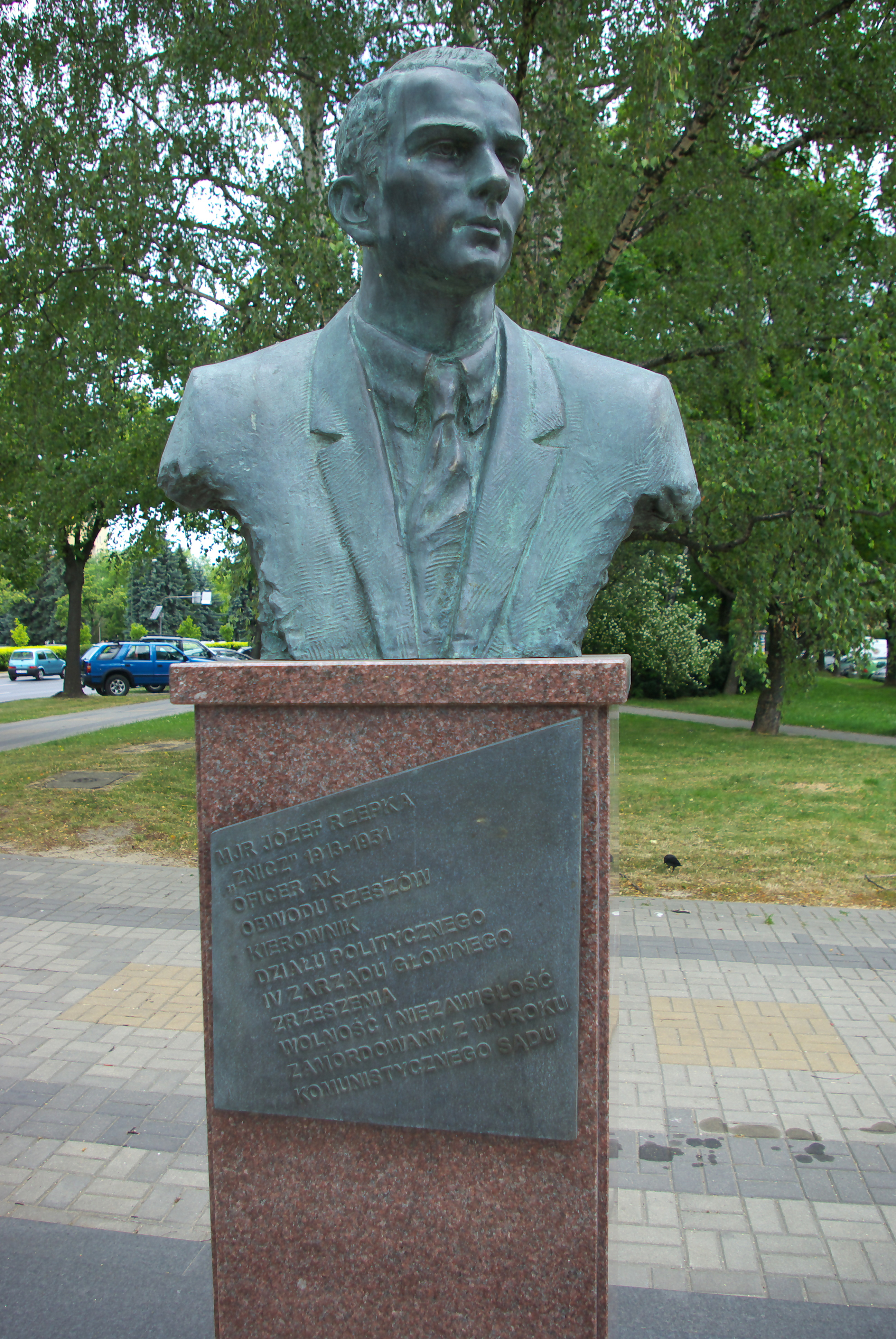 Pomnik Żołnierzy Wyklętych w Rzeszowie przy Alei Łukasza Cieplińskiego. Upamiętniony Józef Rzepka